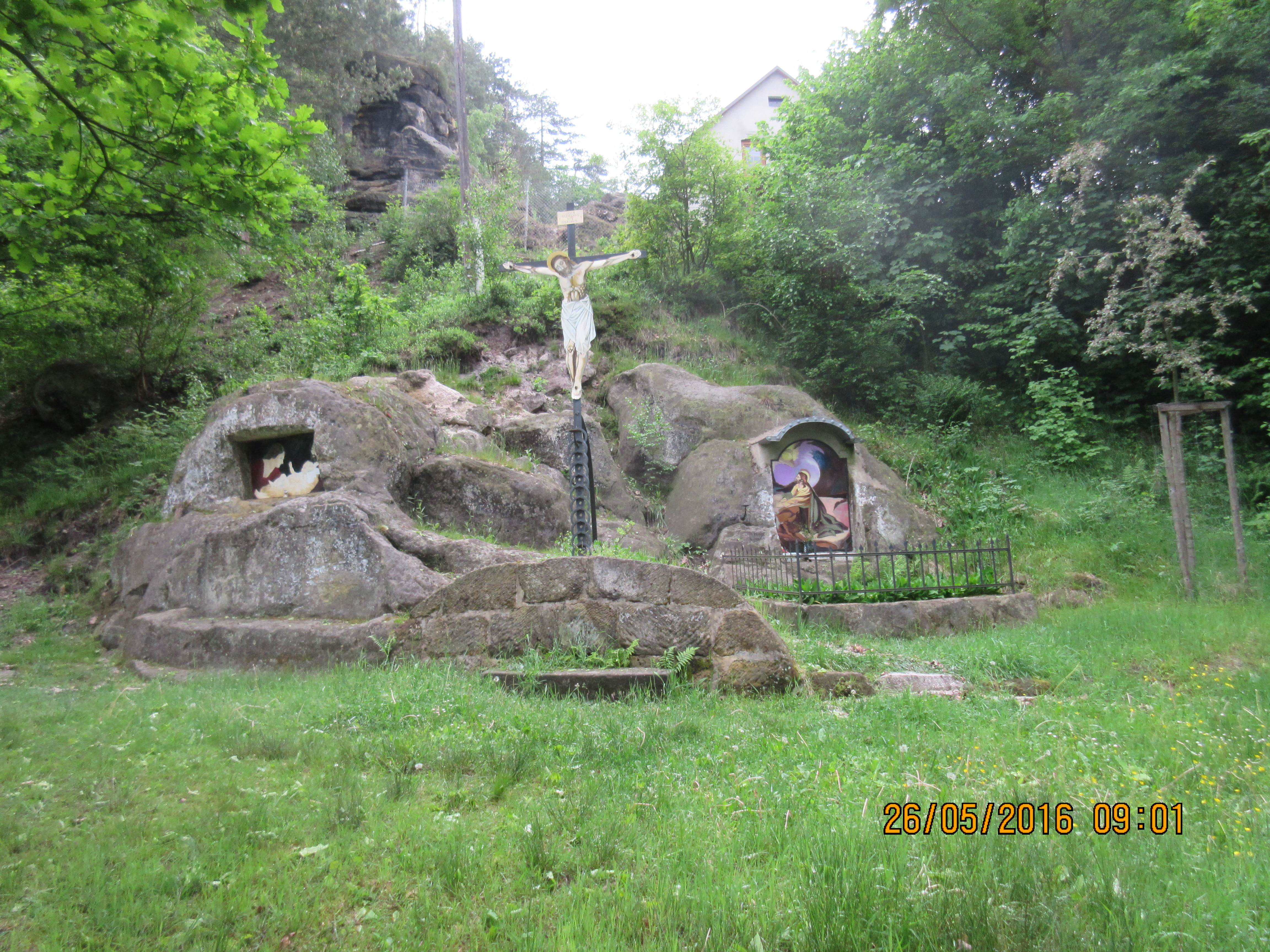 Úvodní partie Křížové cesty u Kamenického Šenova